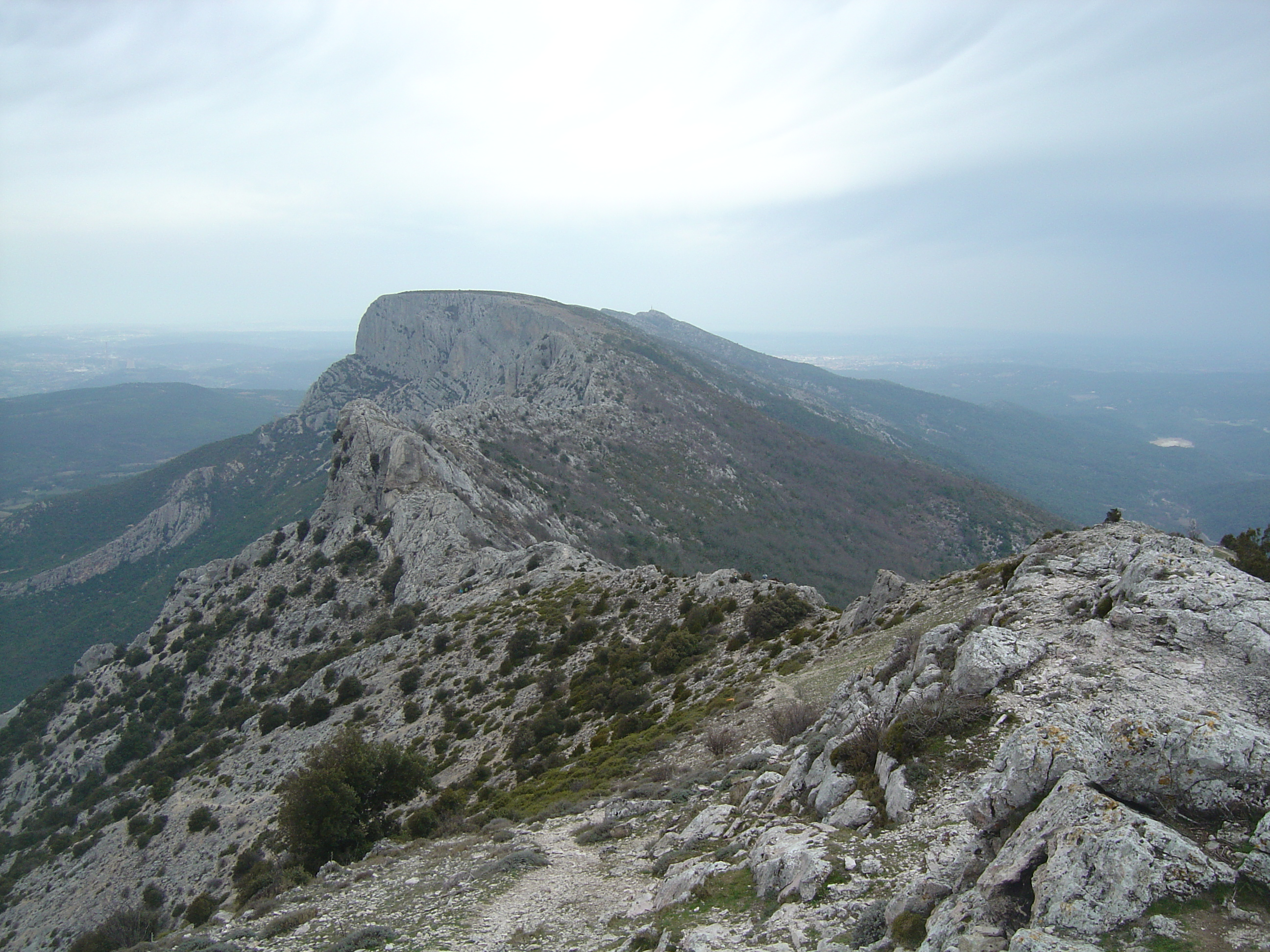 Vue depuis le pic des Mouches sur le Bau des Vespres